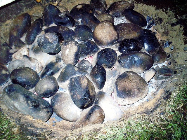 Piedras calientes, listas para preparar un curanto, comida típica de Chiloé (Chile) cocinada en un hoyo en la tierra.